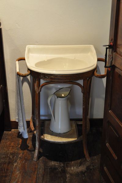 Lavabo de la habitación de invitados